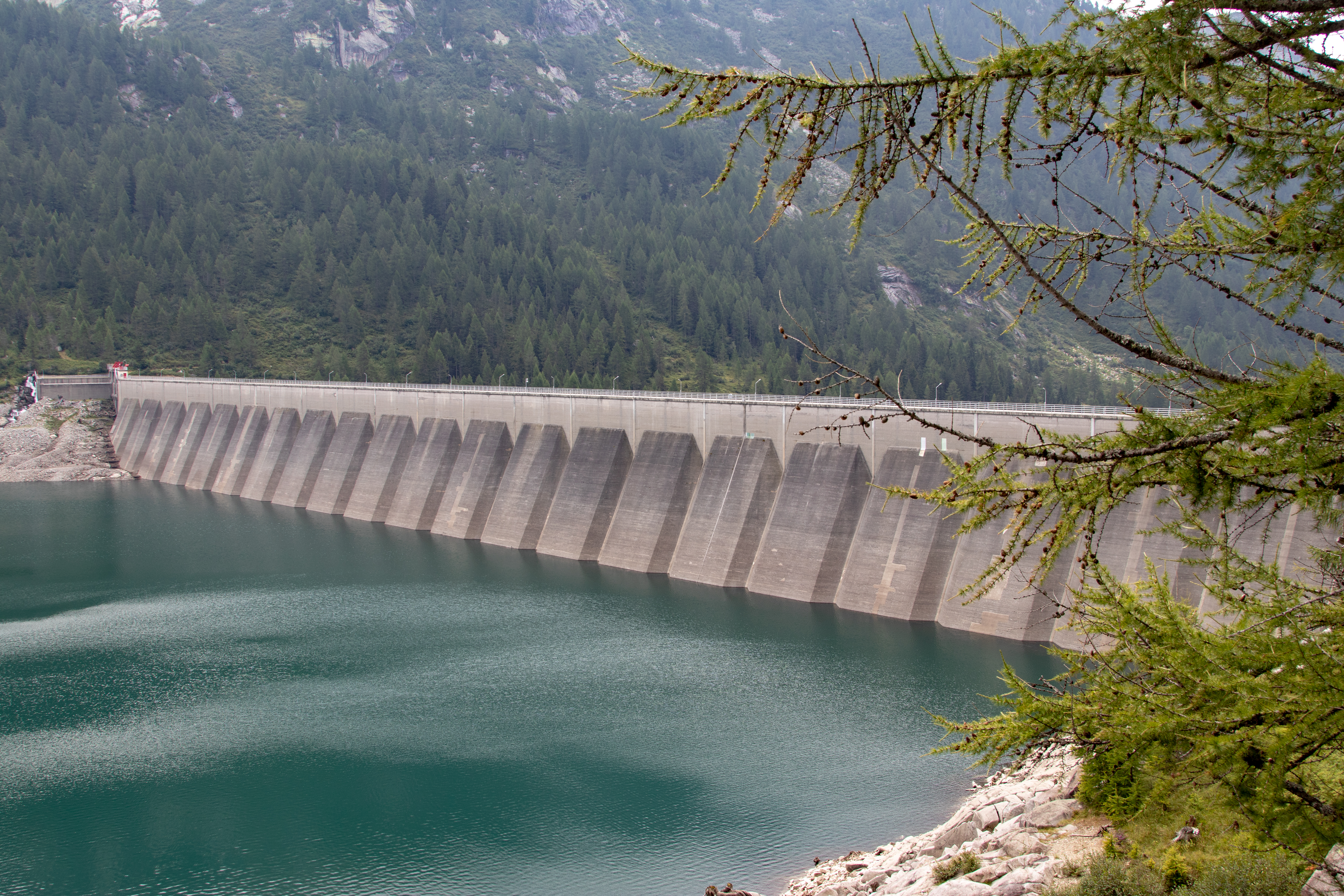 Lago di Malga Bissina